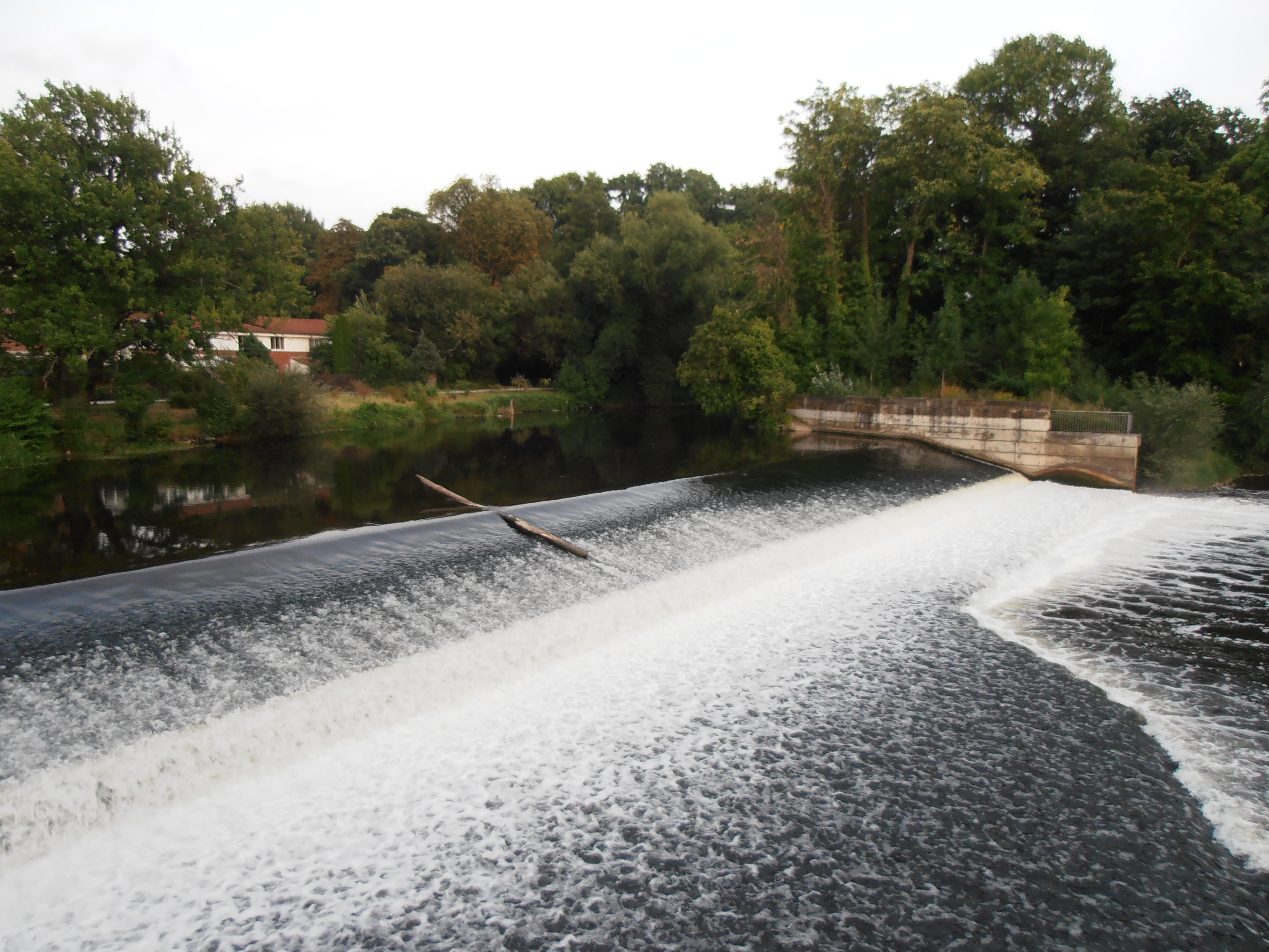 Leinewehr in Hannover-Döhren